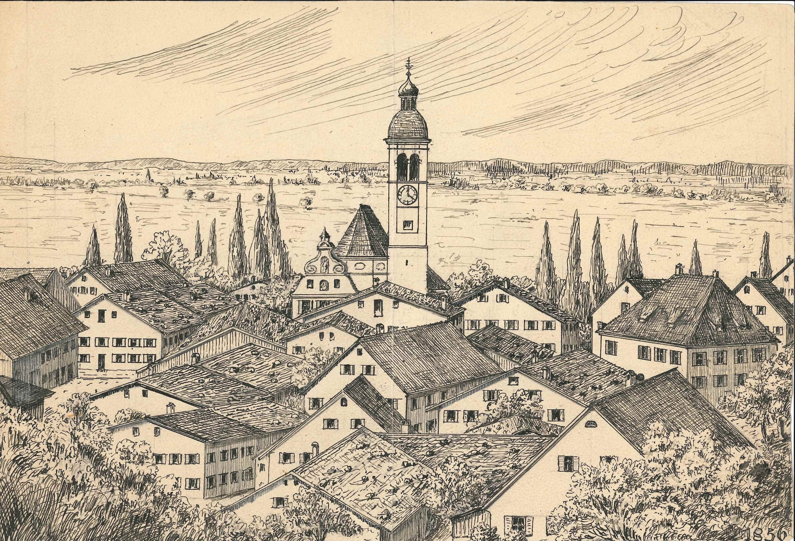 Zeichnung Innerer Markt von Marktoberdorf, 1856 von Ludwig Wilhelm Fischer angefertigt.